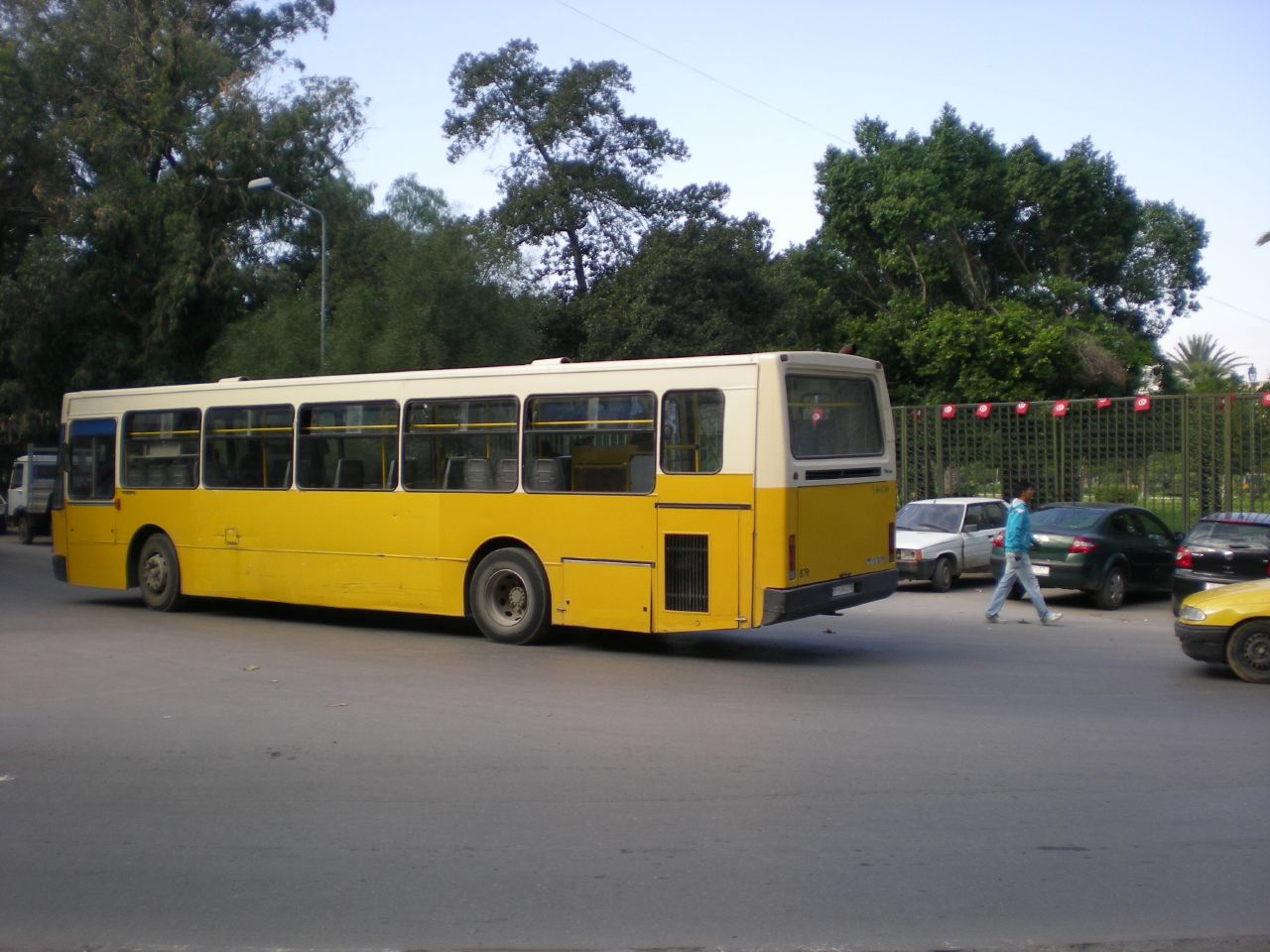 Bus - Tunis (Tunisie)